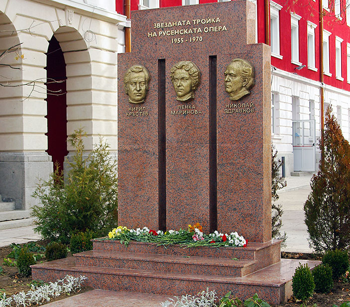 Барелеф на Кирил Кръстев, Пенка Маринова и Николай Здравков, Русе